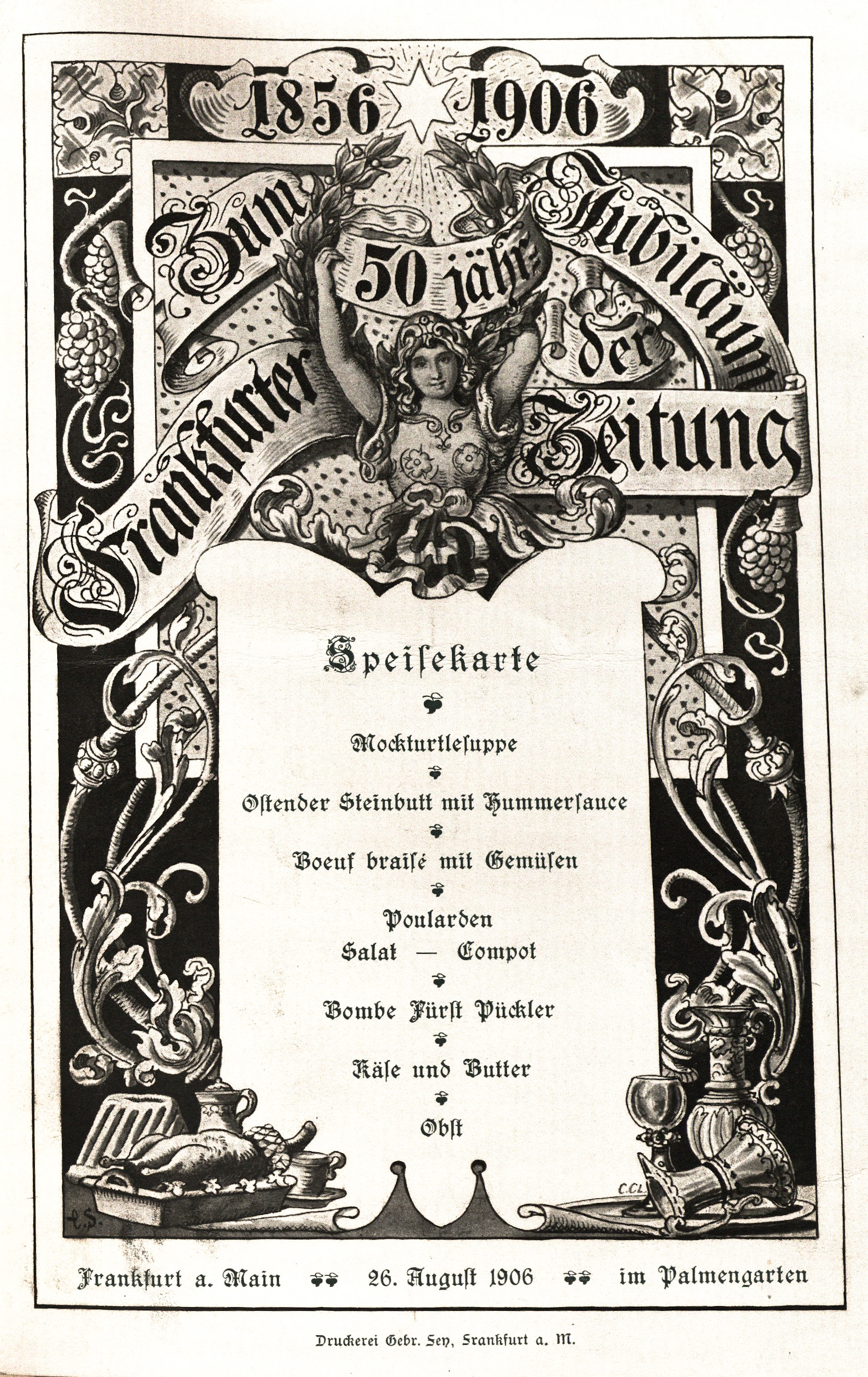 Festbeilage der Jubiläumsausgabe "50 Jahre Frankfurter Zeitung", veröffentlicht am Sonntag, den 26. August 1906. Hier: Das kulinarische Menü der großen Feier in Frankfurts Palmengarten